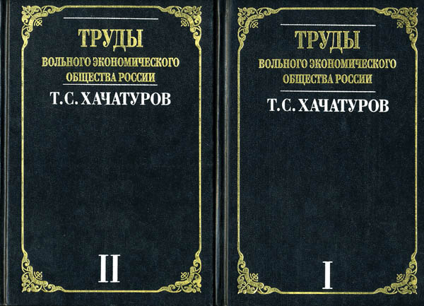 Сочинения в 2 томах